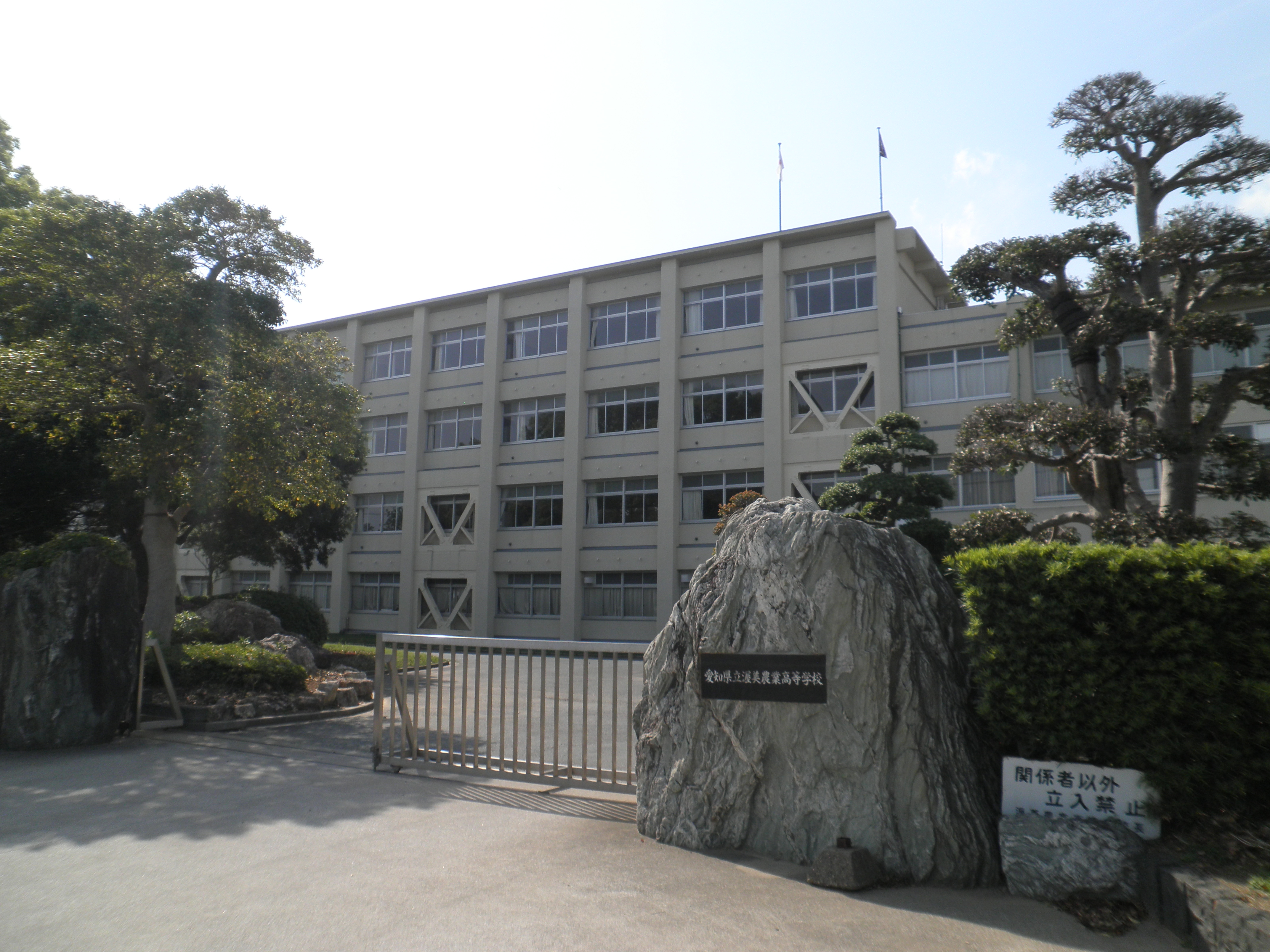 愛知県田原市にある県立渥美農業高校